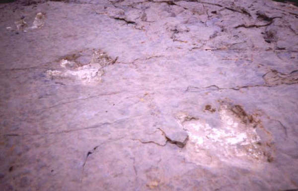 Huellas en un yaciemiento cercano a Muro de Aguas (La Rioja, España).